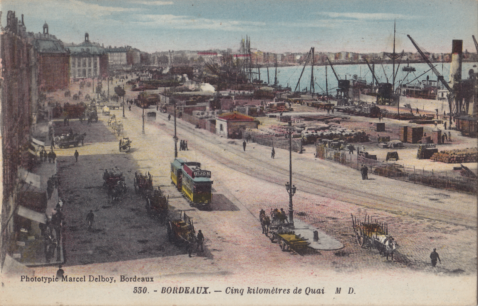 Carte postale ancienne éditée par Marcel Delboy (MD) à Bordeaux, n°330 :BORDEAUX - Cinq kilomètres de Quai